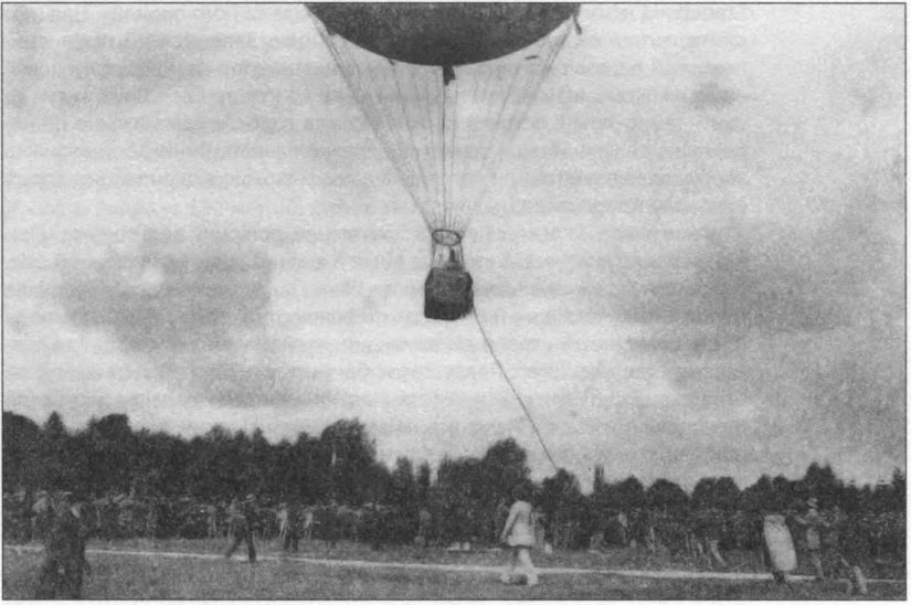 Приземлення повітряної кулі біля м. Злочів